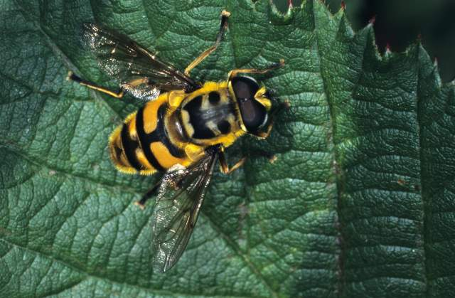 Myatropa florea, Gradignan, Gironde, France